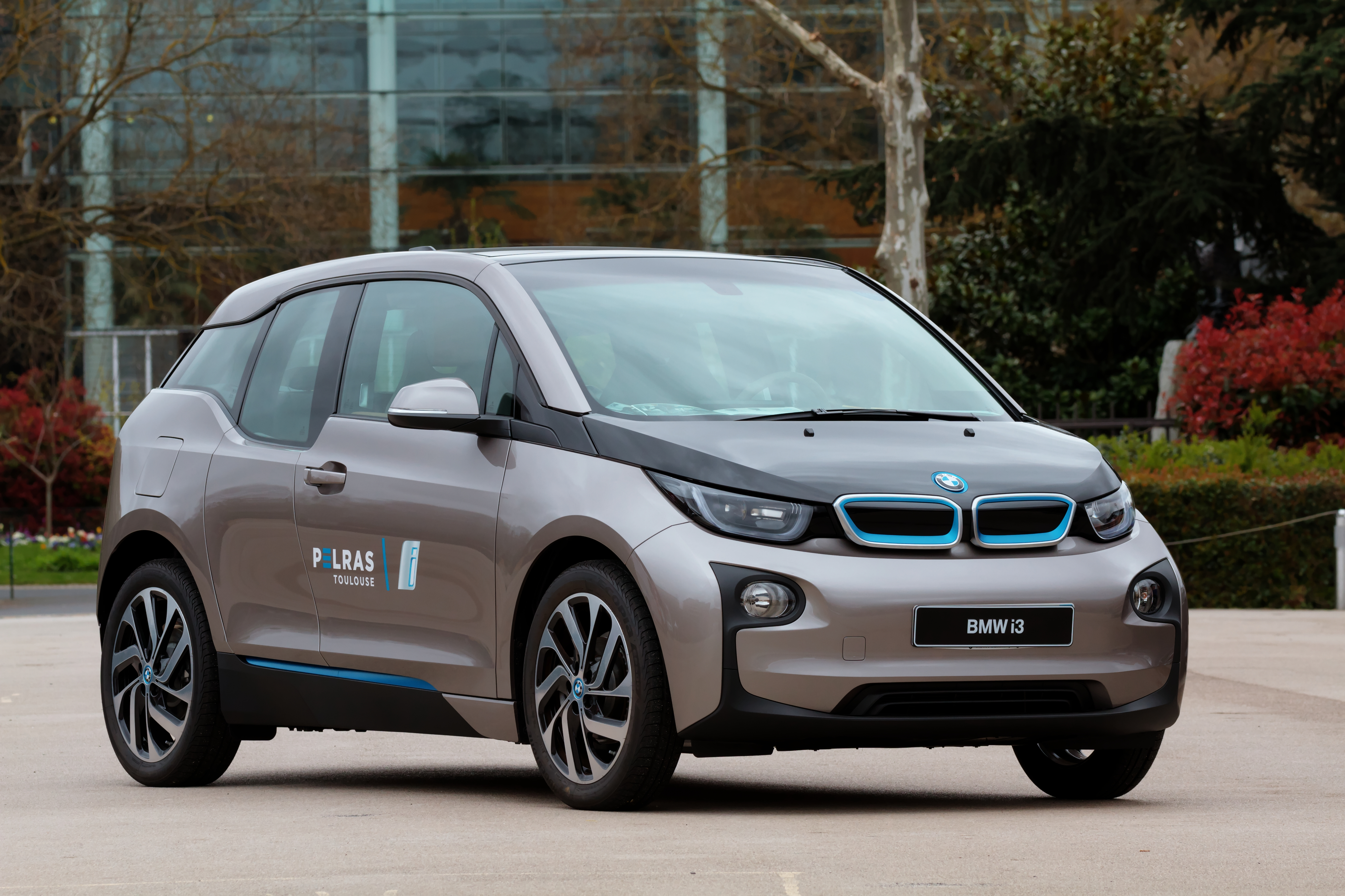 BMW i3 lors de la Toulousaine de l'automobile.